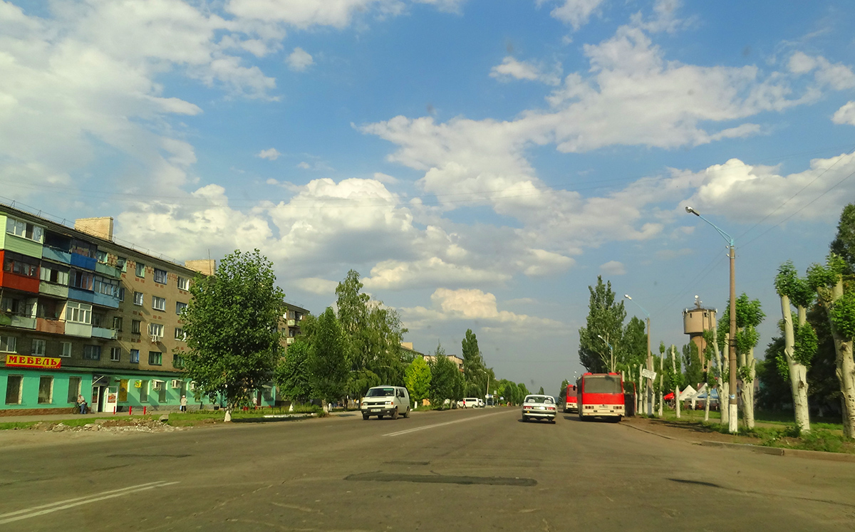 Первомайск ул.Трудовая